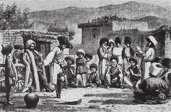 Картина известного русского художника Василия Верещагина "Лезгинка", который после посещения Южного Дагестана и Елизаветпольской губернии написал эту картину, наблюдая за обычаями и традициями лезгин.